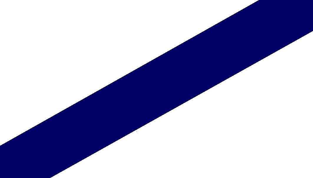 Colores representativos del Club Union de Curtidores.